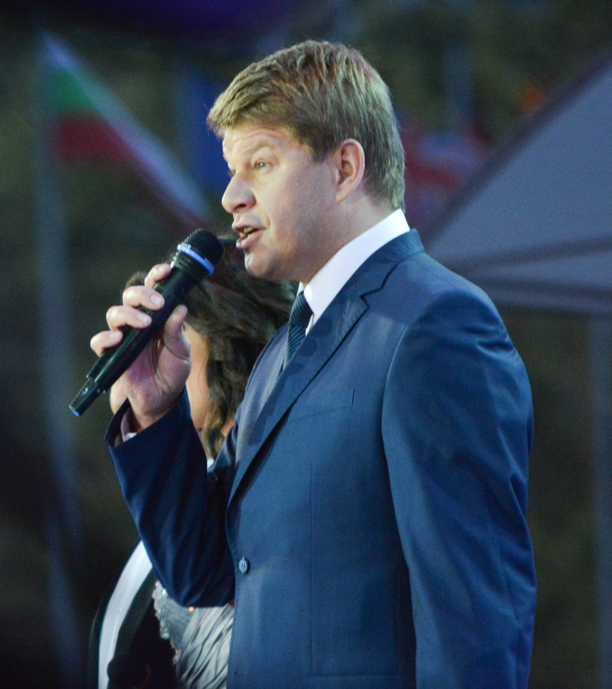 Дмитрий Губерниев. Открытие фестиваля «Славянский Базар в Витебске» 2014.